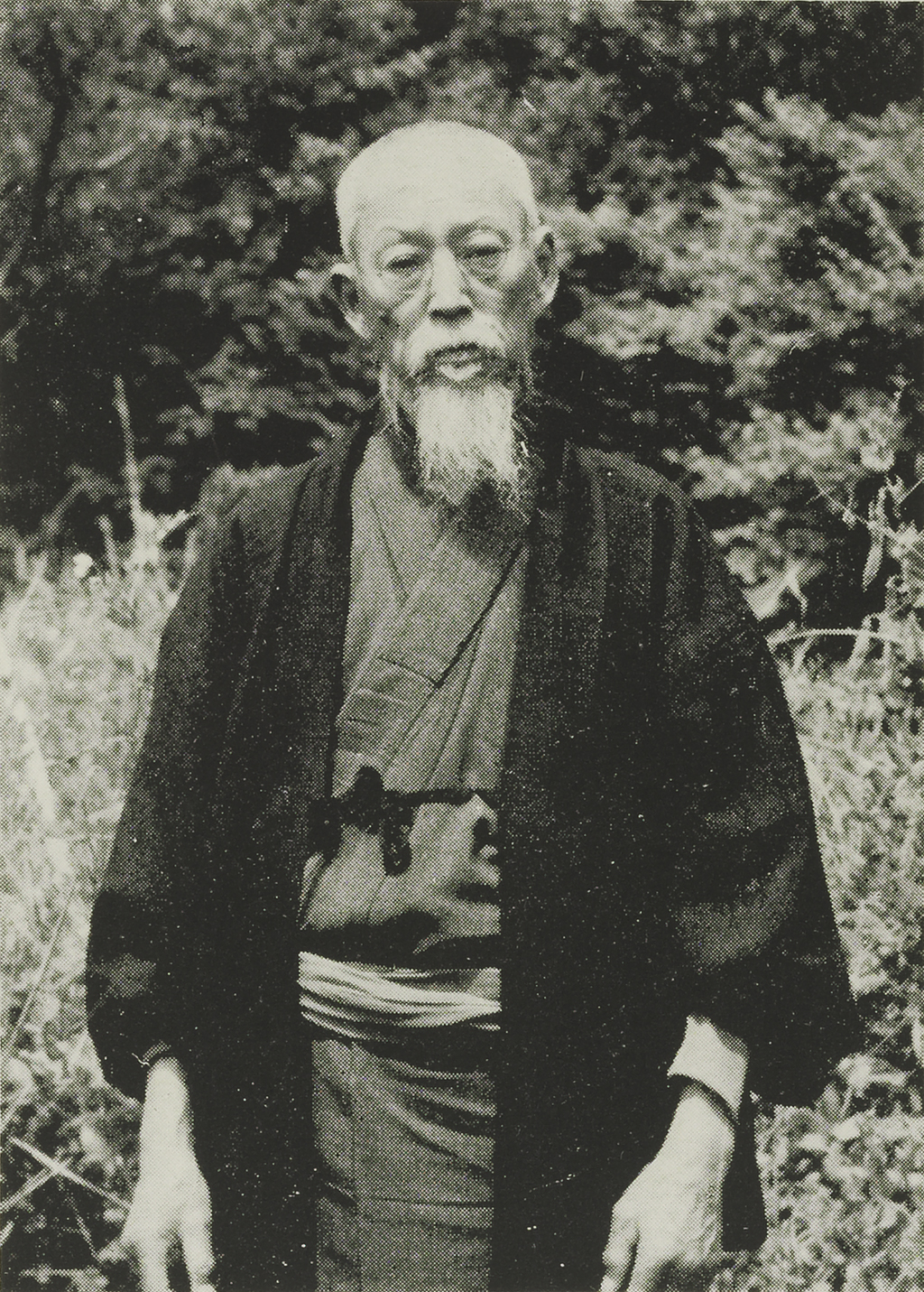 Portrait of Kodama Kenji (児玉謙次, 1871 – 1954)